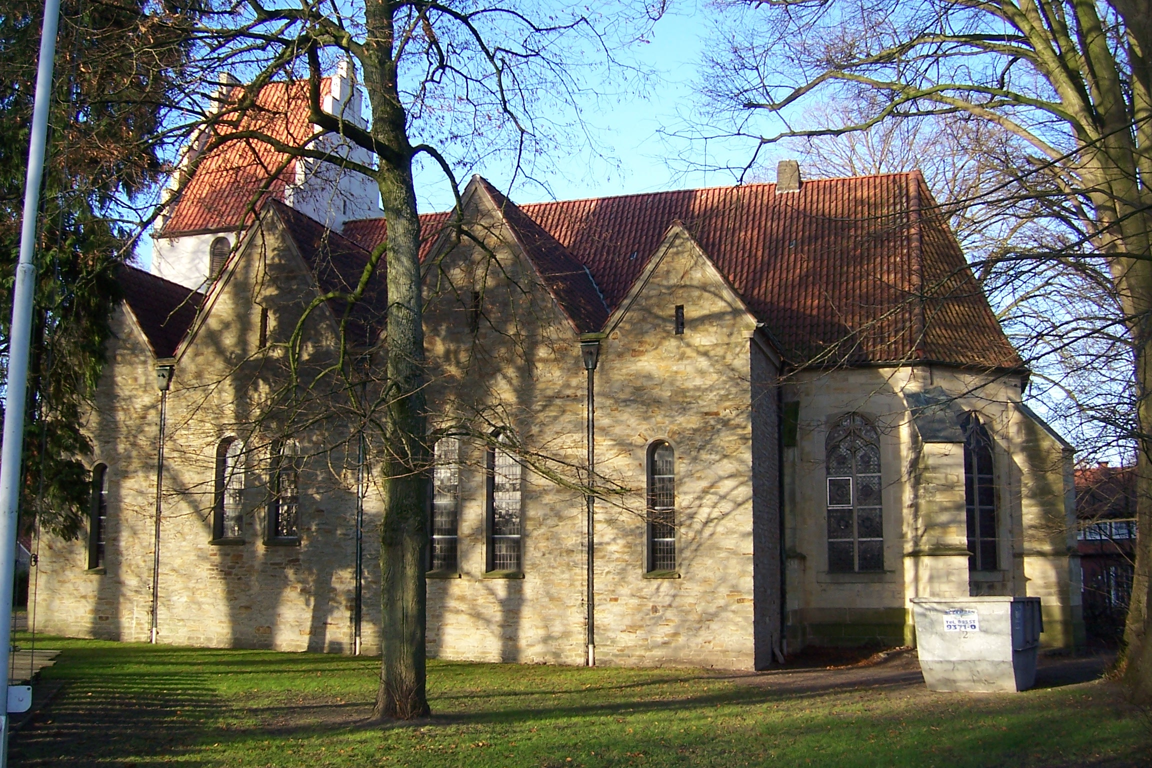 Kirche in Eggerode, Kreis Borken, NRW